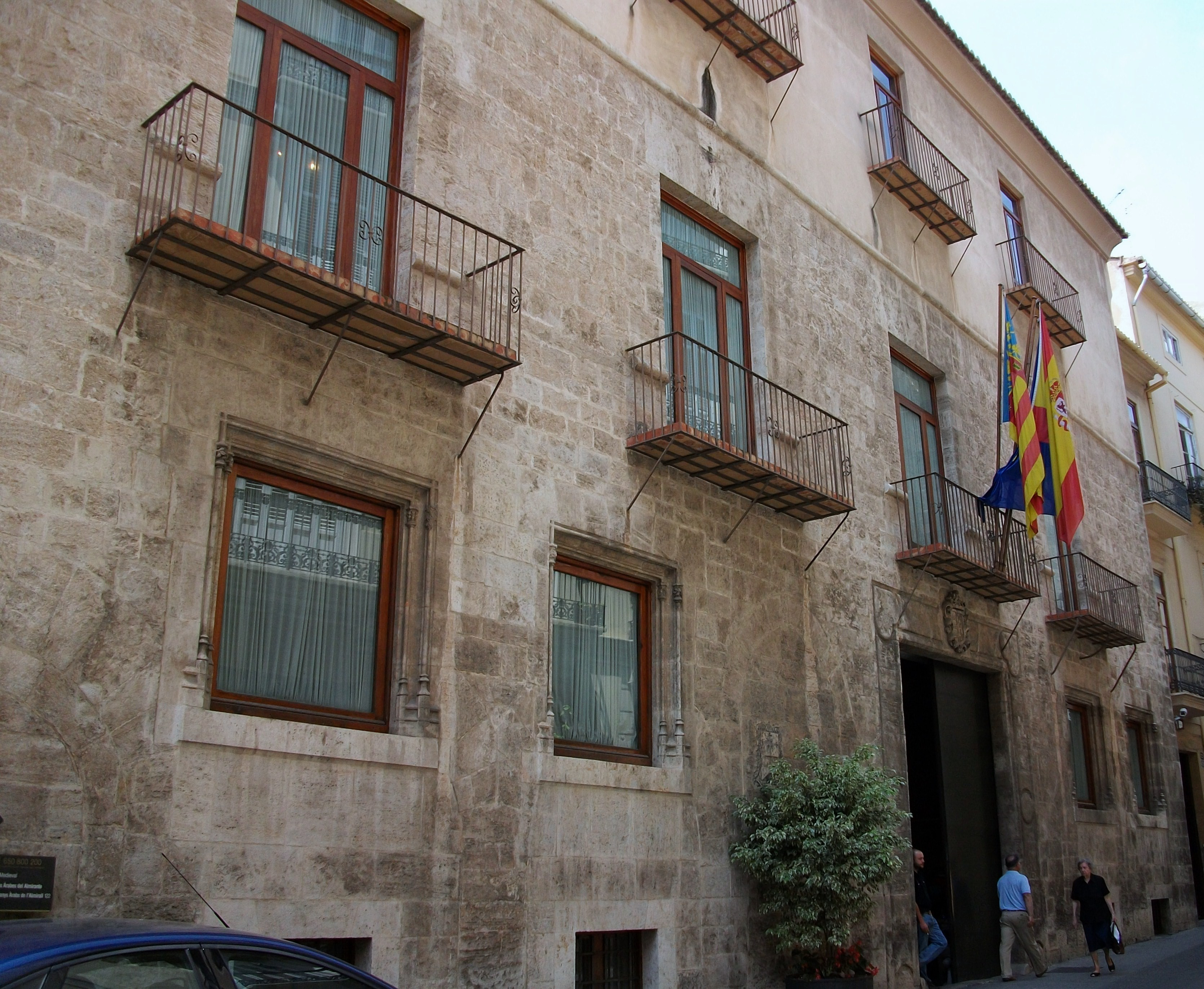 Façana del palau de l'Almirall de València.